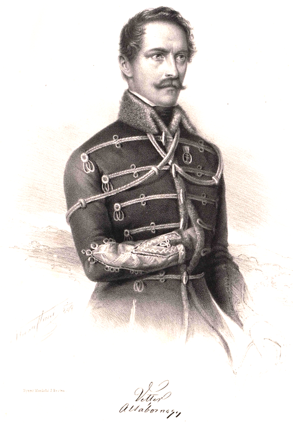 Vetter Antal (1803-1882) honvéd altábornagy, a honvédség főparancsnoka